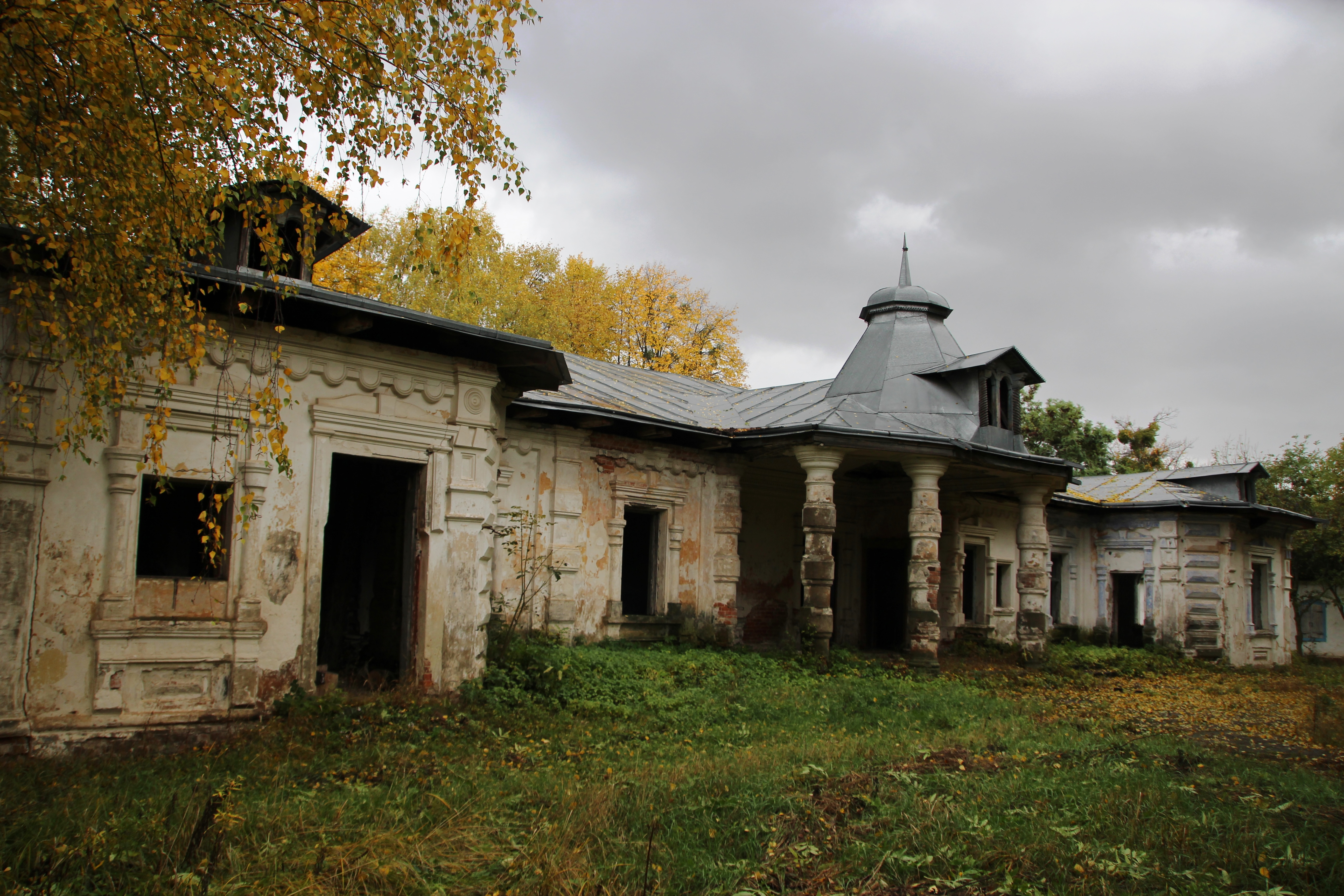 Головний будинок, в якому зупинявся Т. Г. Шевченко (зміш.), село Лифине, вул. Лифинська